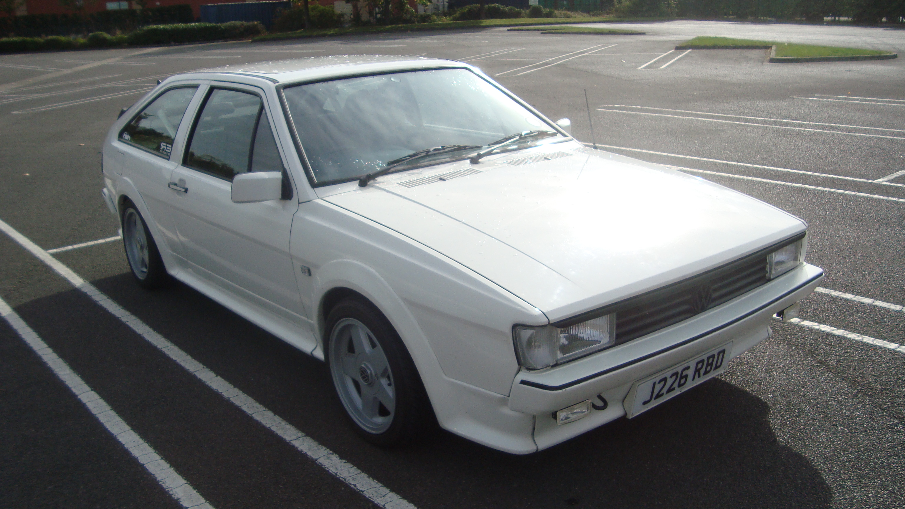 1992 Volkswagen Scirocco 1.8 Scala